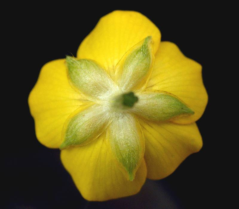 Ranunculus repens